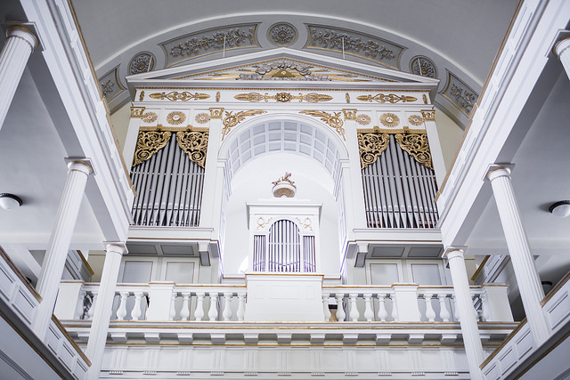 Kálvin téri református templom, Budapest, 2015. Rekonstrukció.